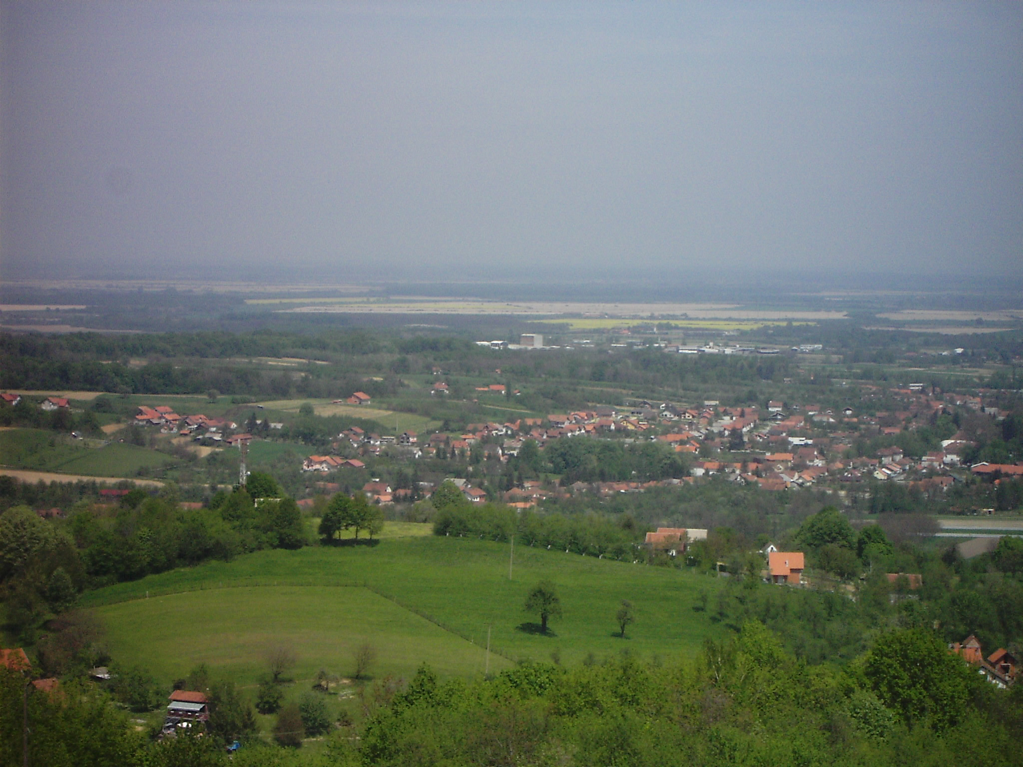 Panoramic view of Orahovica, Croatia